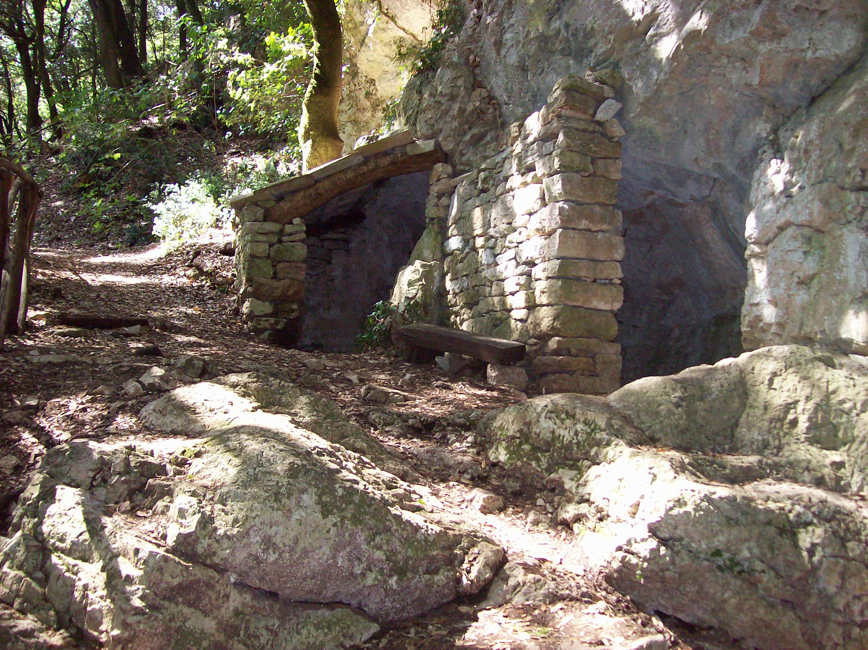 Eremo delle Carceri (Assisi). Grotta di Frate Silvestro.